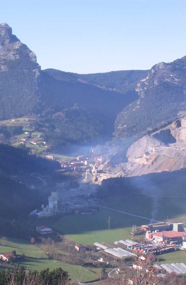 Vista general de la anteiglesia de Mañaria , Vizcaya, País Vaco, España.